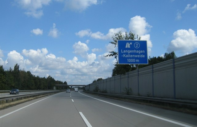 A352 - Kreuz (2) Langenhagen-Kaltenweide, 2000m